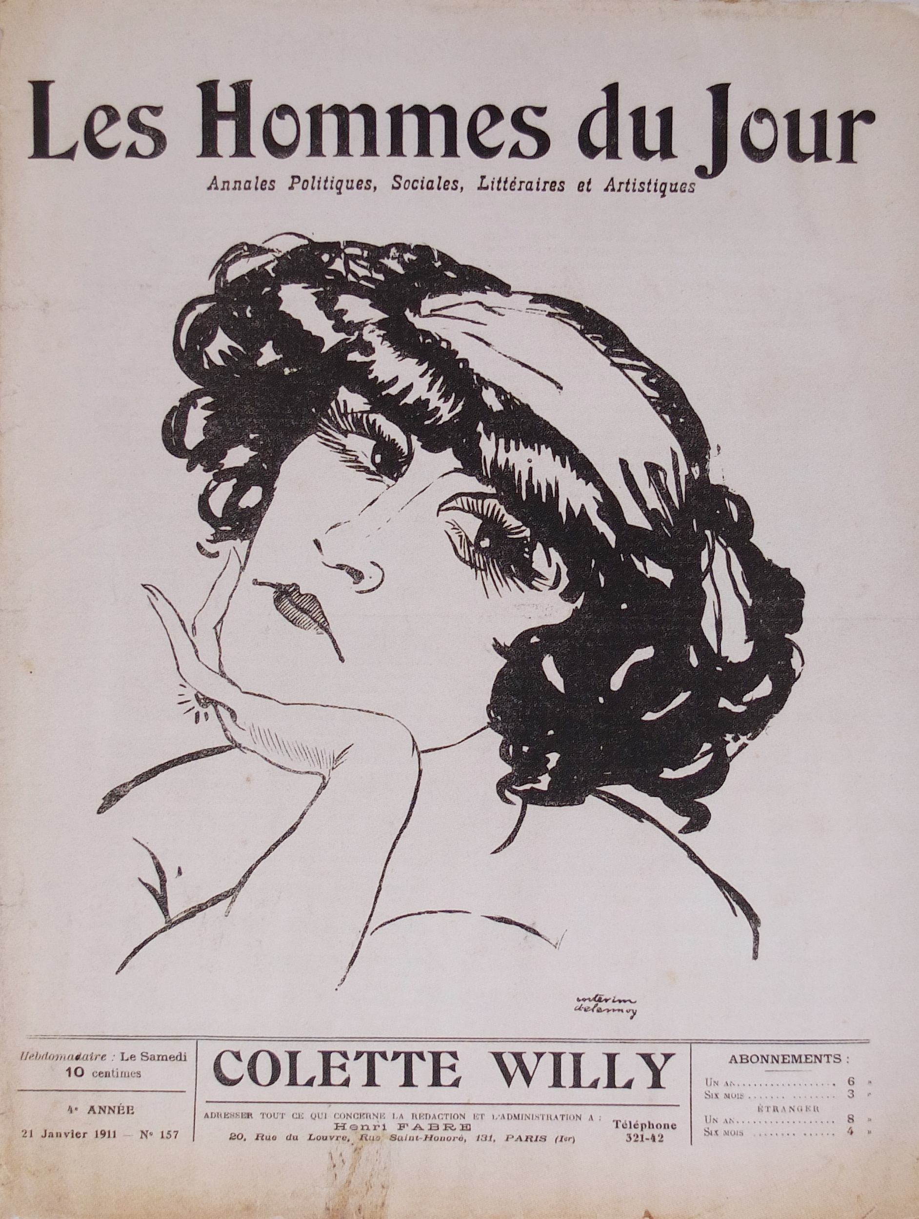 Les Hommes du Jour, n°157 du samedi 21 janvier 1911. Portrait de Colette par Aristide Delanoy.